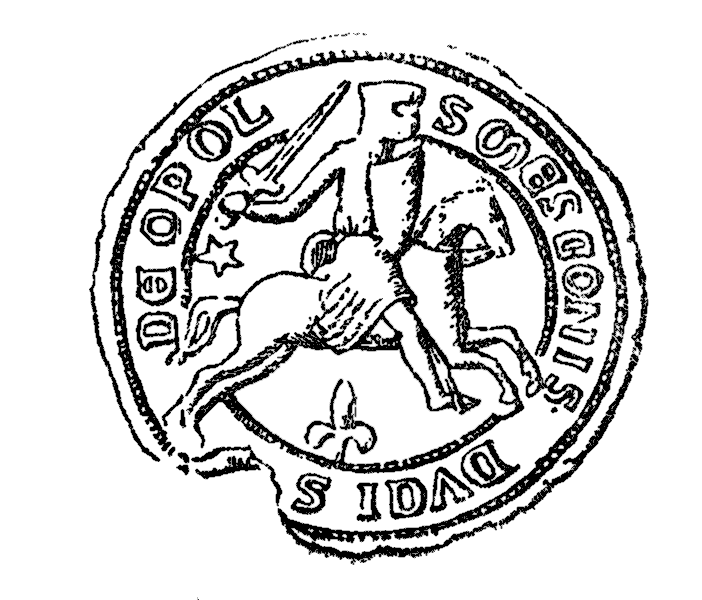 Mieszko II Otyły seal 1245